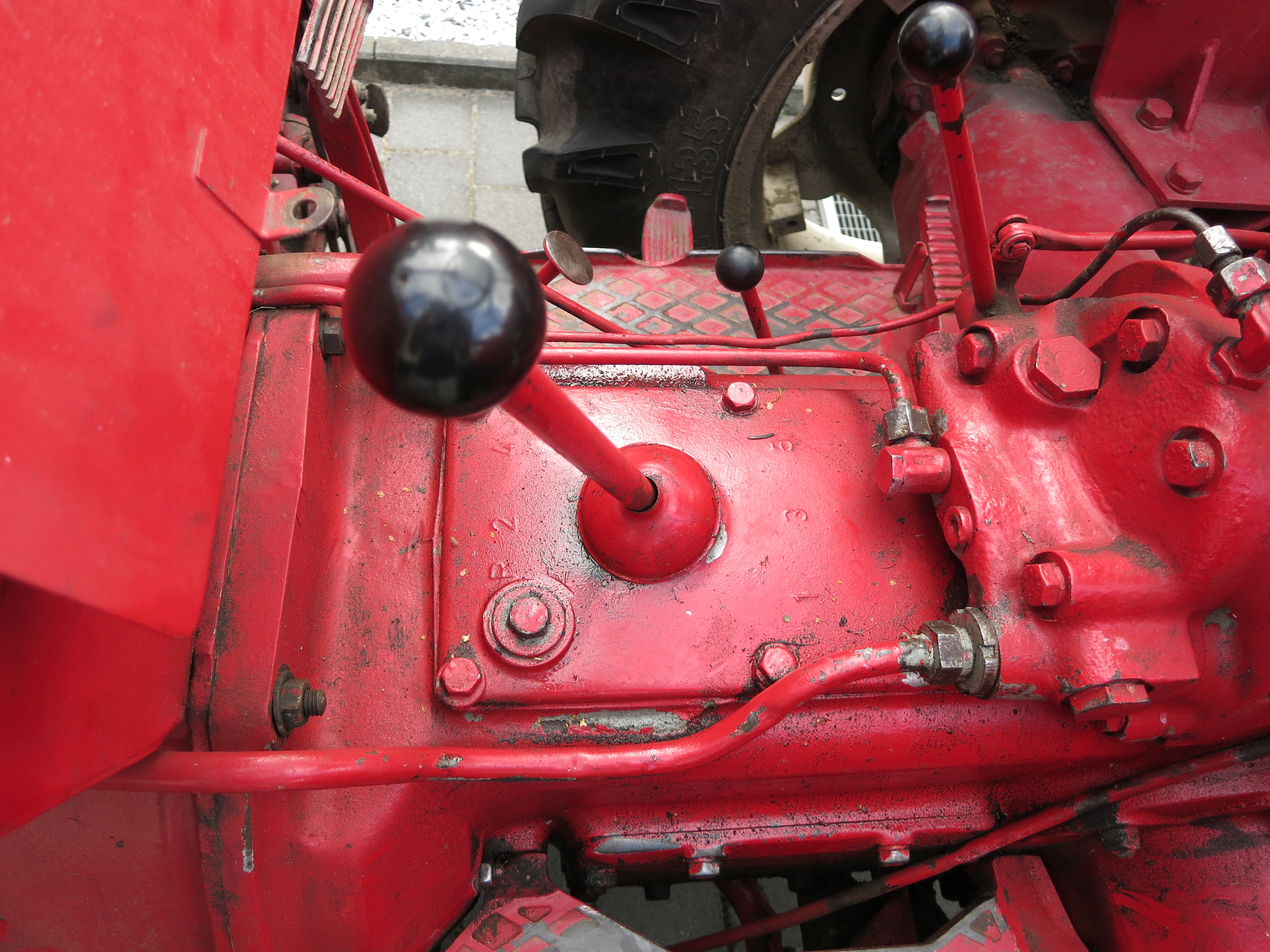 Schalthebel eines Porsche 218